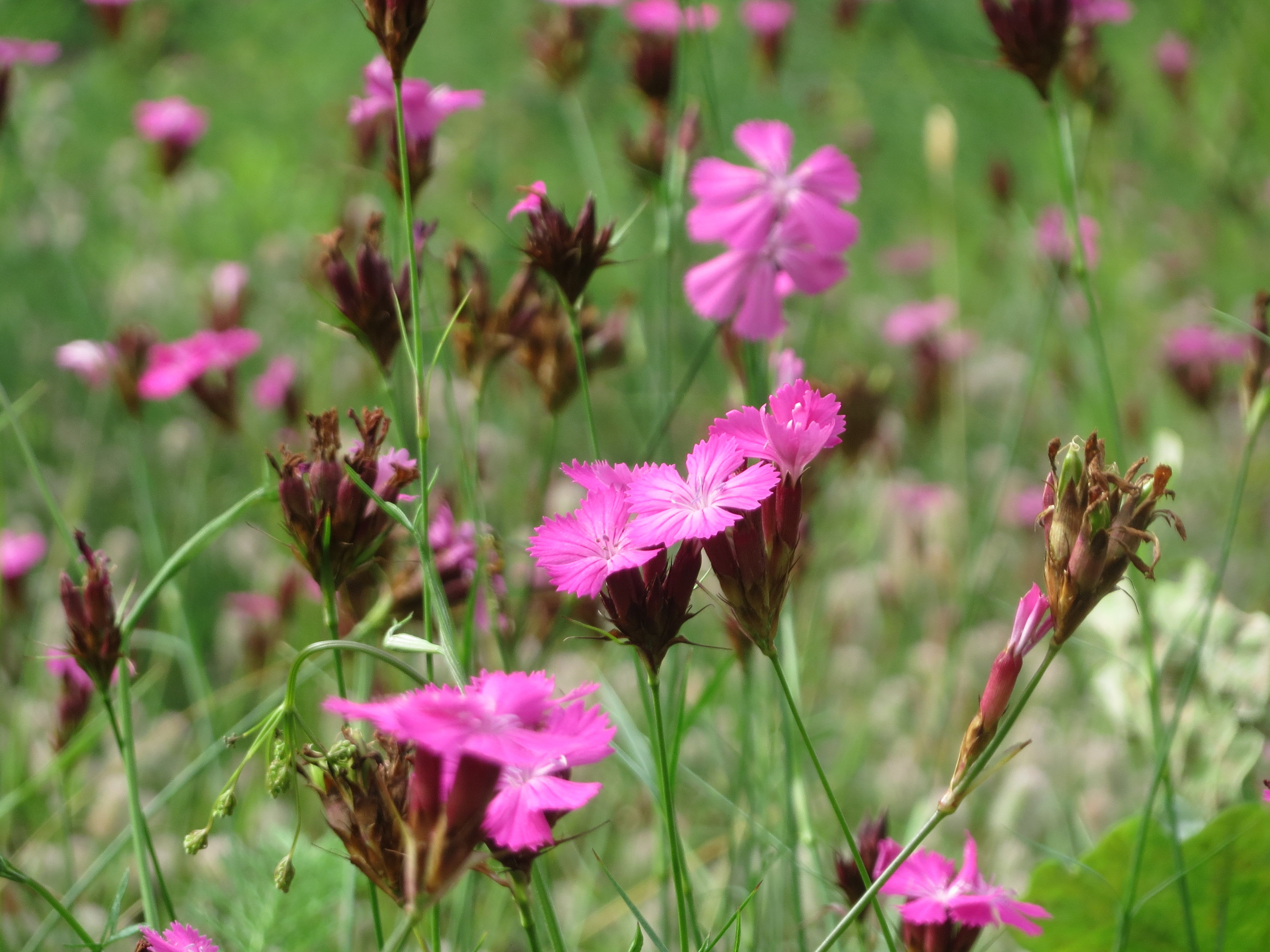 Kartäusernelke (Dianthus carthusianorum) im Schwetzinger Hardt - an der Bahnstrecke Mannheim-Karlsruhe findet sich ein kleines Sandmagerrasen-Biotop mit typischer Binnendünen-Vegetation. Insbesondere ist hier die Kartäusernelke recht häufig.